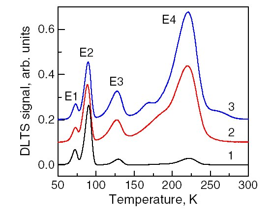 Spektroskopia poziomów energetycznych defektów - typowe widmo konwencjonalnego DLTS.